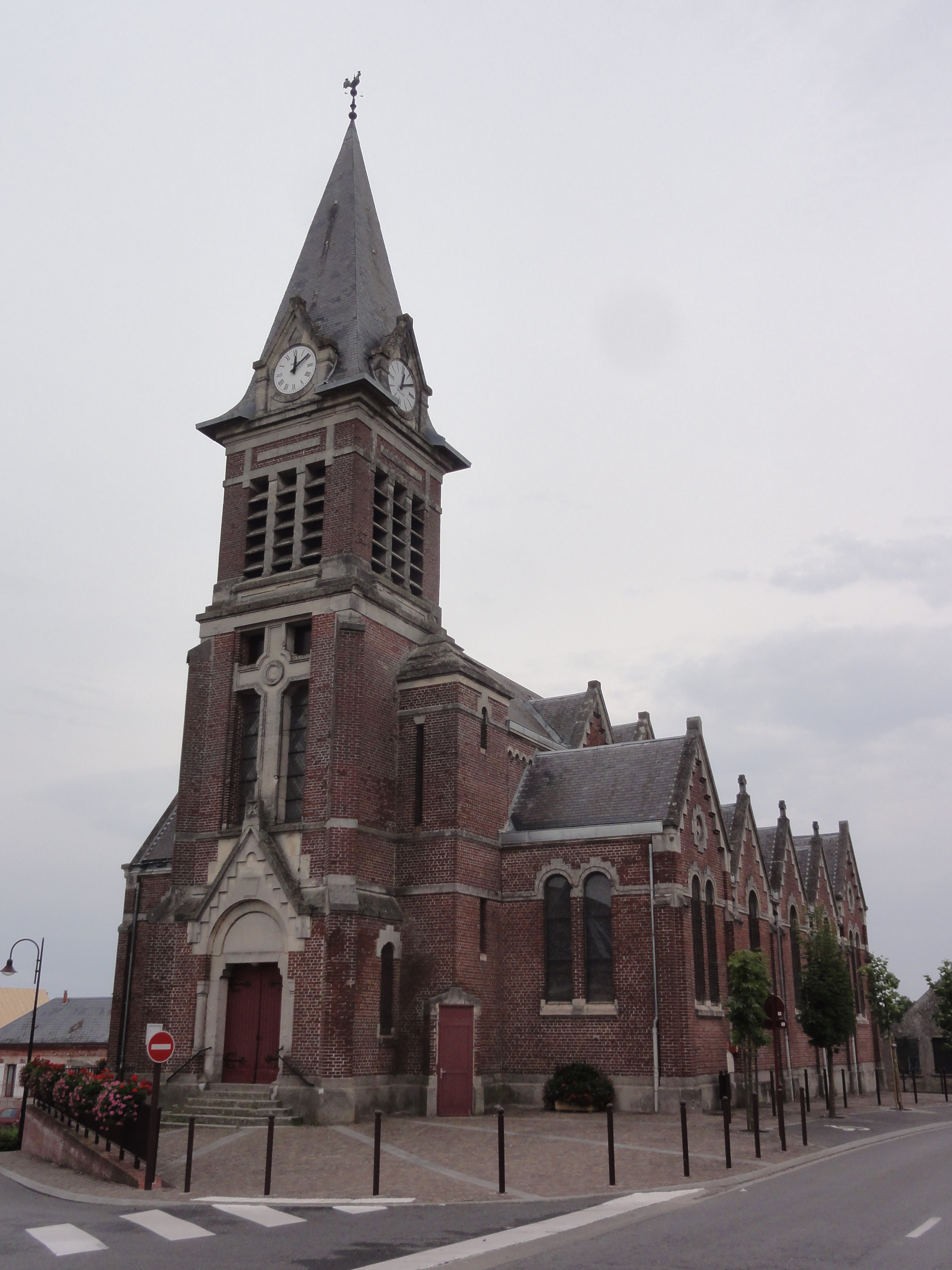 Seboncourt (Aisne) église